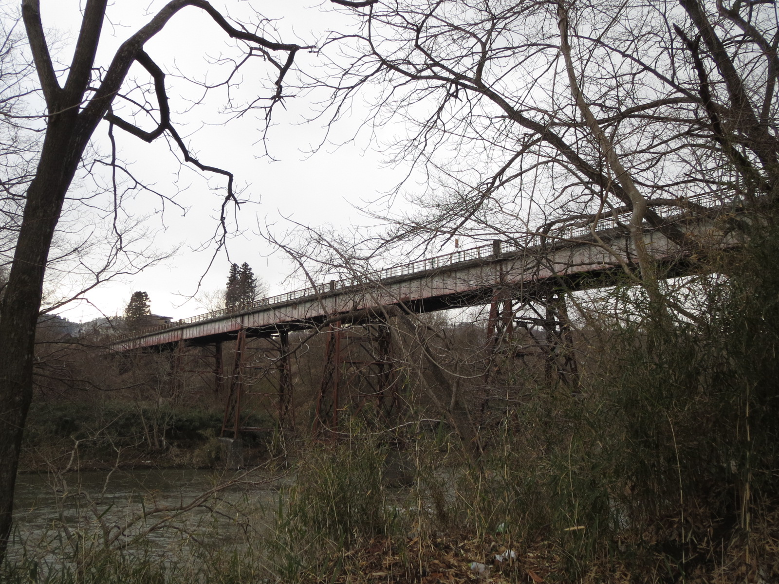 青森・岩手県境にある青岩橋 Canon IXY 3